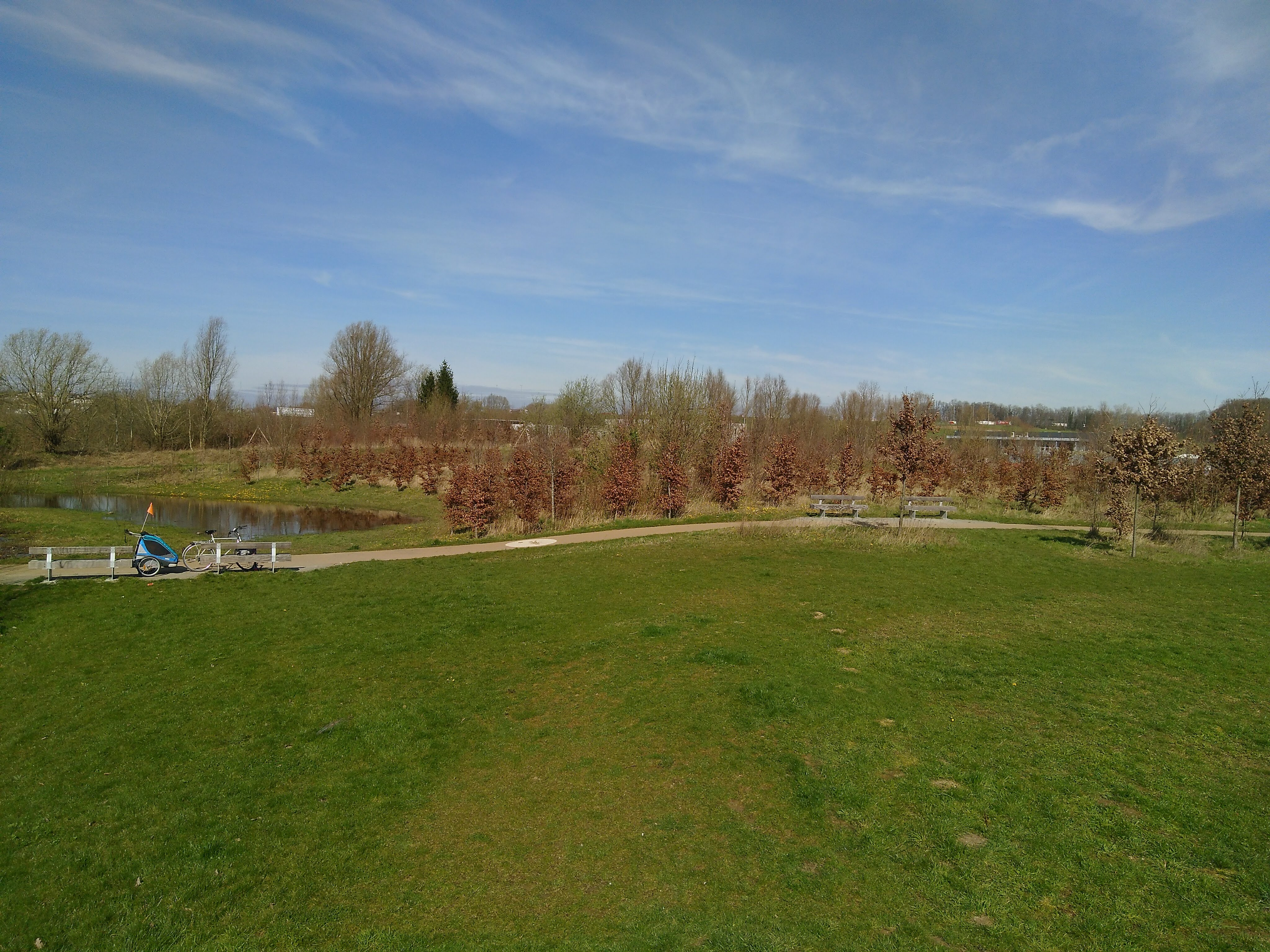 Parklint, onderdeel van het Kerremansbos in Zellik